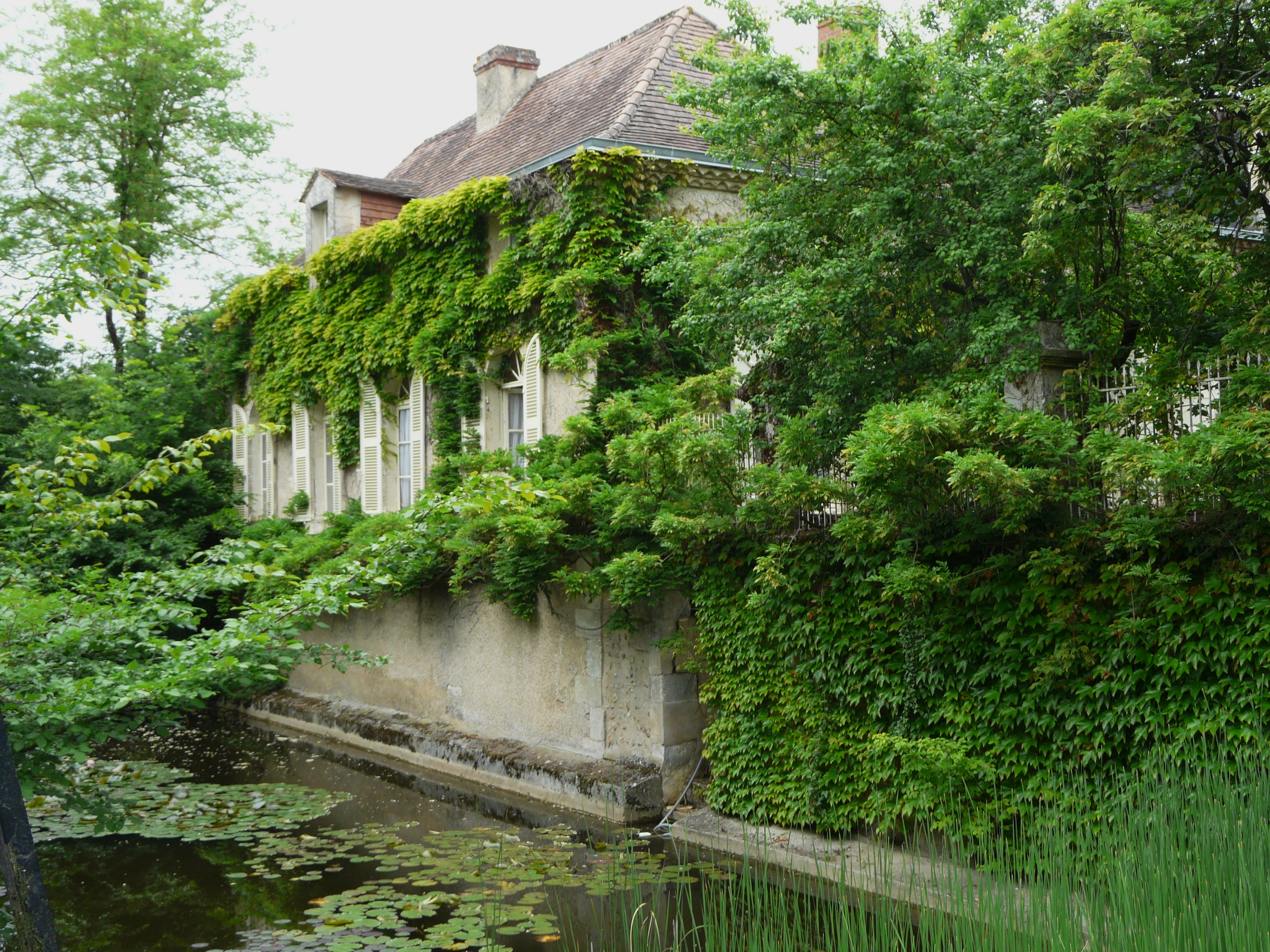 La chartreuse de la Grèze, Creyssensac-et-Pissot, Dordogne, France.